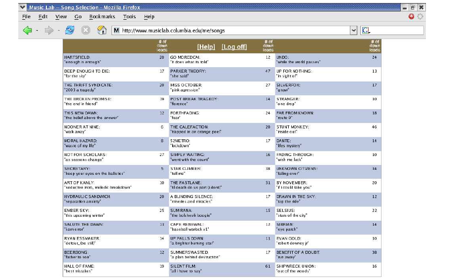 תצוגת השירים בשלוש עמודות